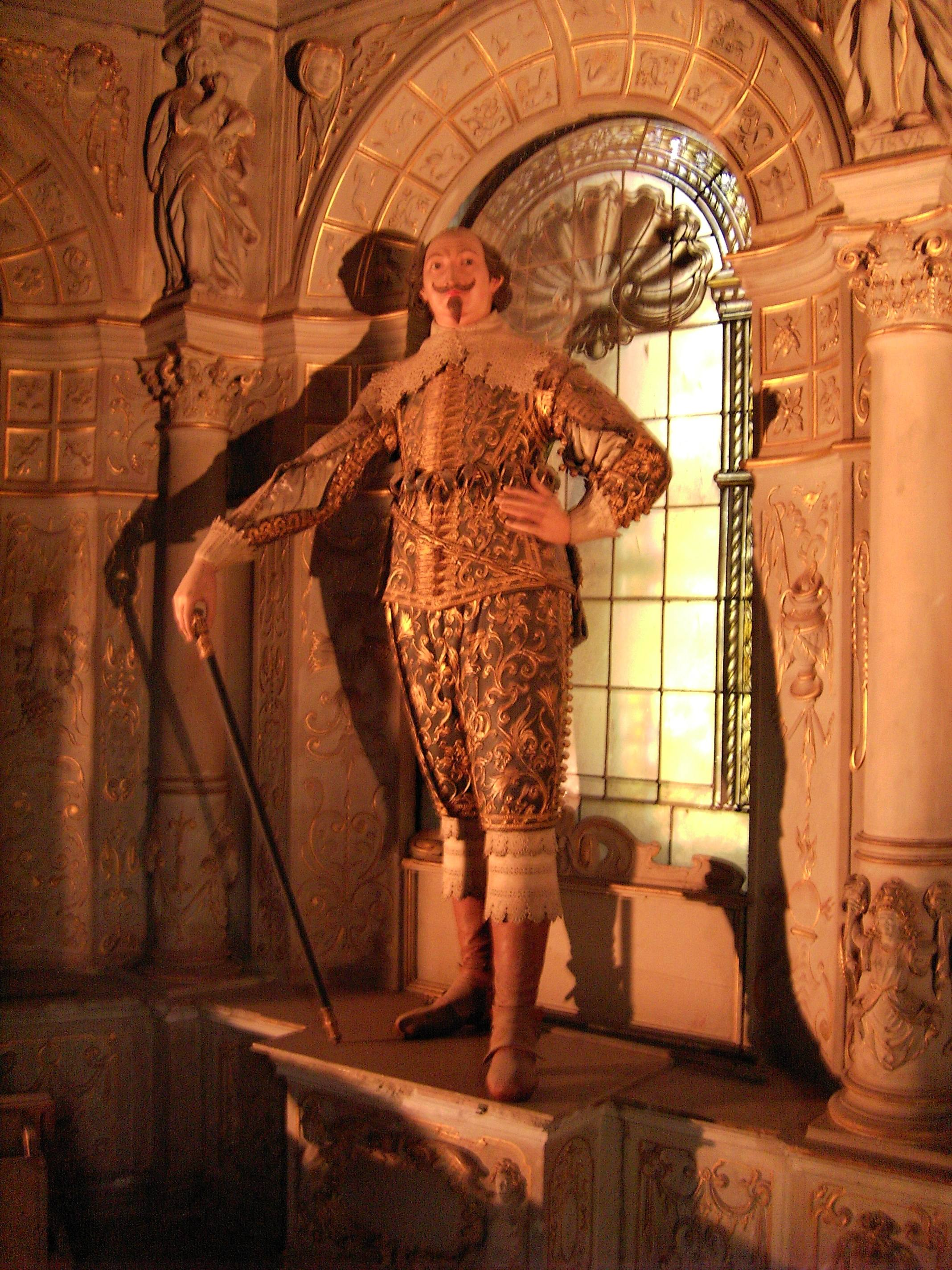 Statue von Adolf Friedrich I. von Mecklenburg-Schwerin im Münster von Bad Doberan.